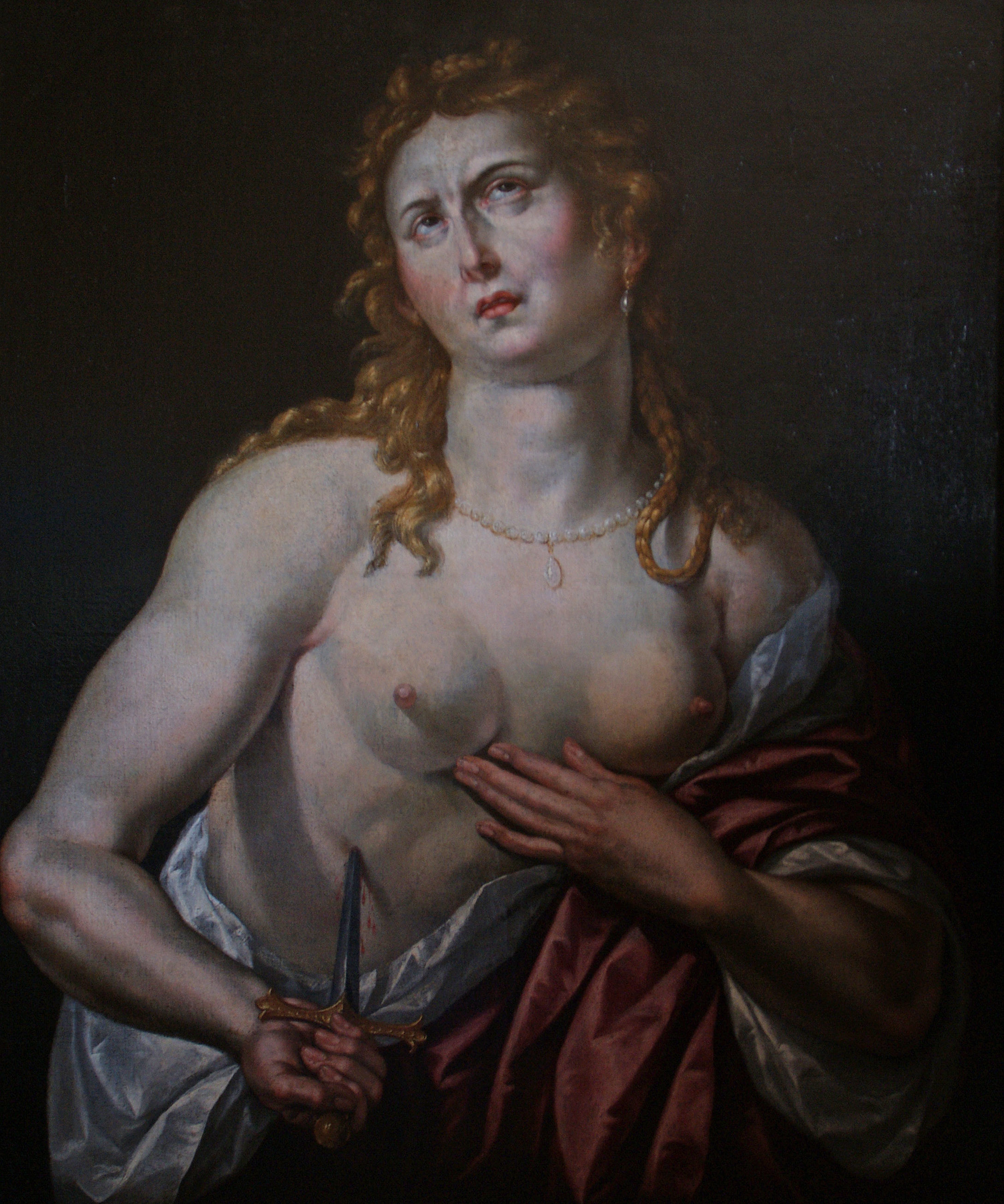 Lucretia